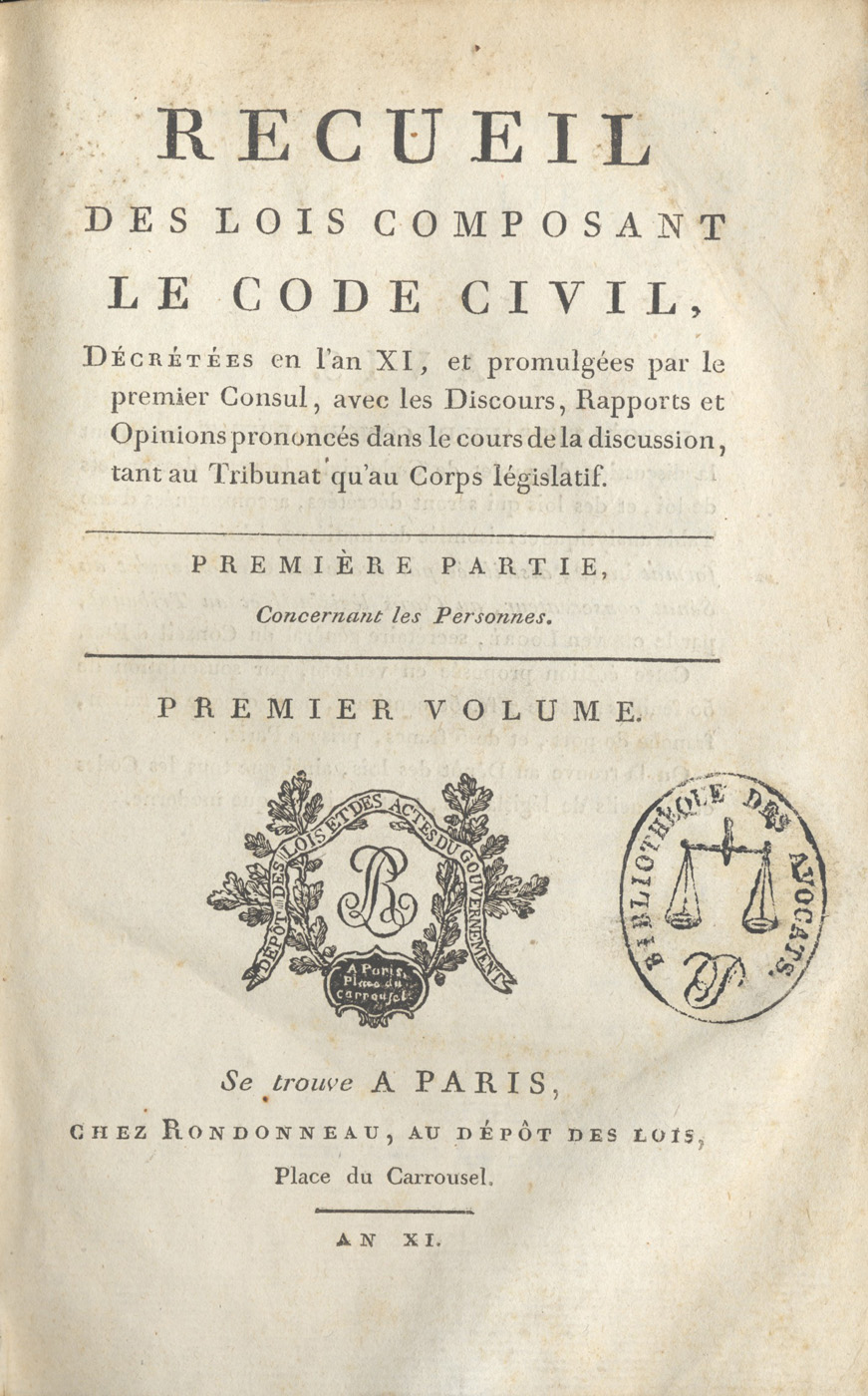 Frontispice du tome I/9 du livre Recueil des lois composant le Code civil avec les discours des orateurs du gouvernement. Publication au fur et à mesure des travaux, avant la numérotation des articles.